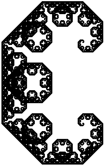 Lévys c-kurva Kategori:Bilder av fraktaler